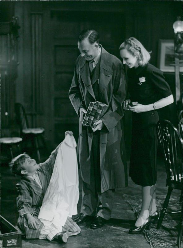 Tom Olsson, Håkan Westergren och Inga Tidblad i Guldbröllop på Dramaten i Stockholm.